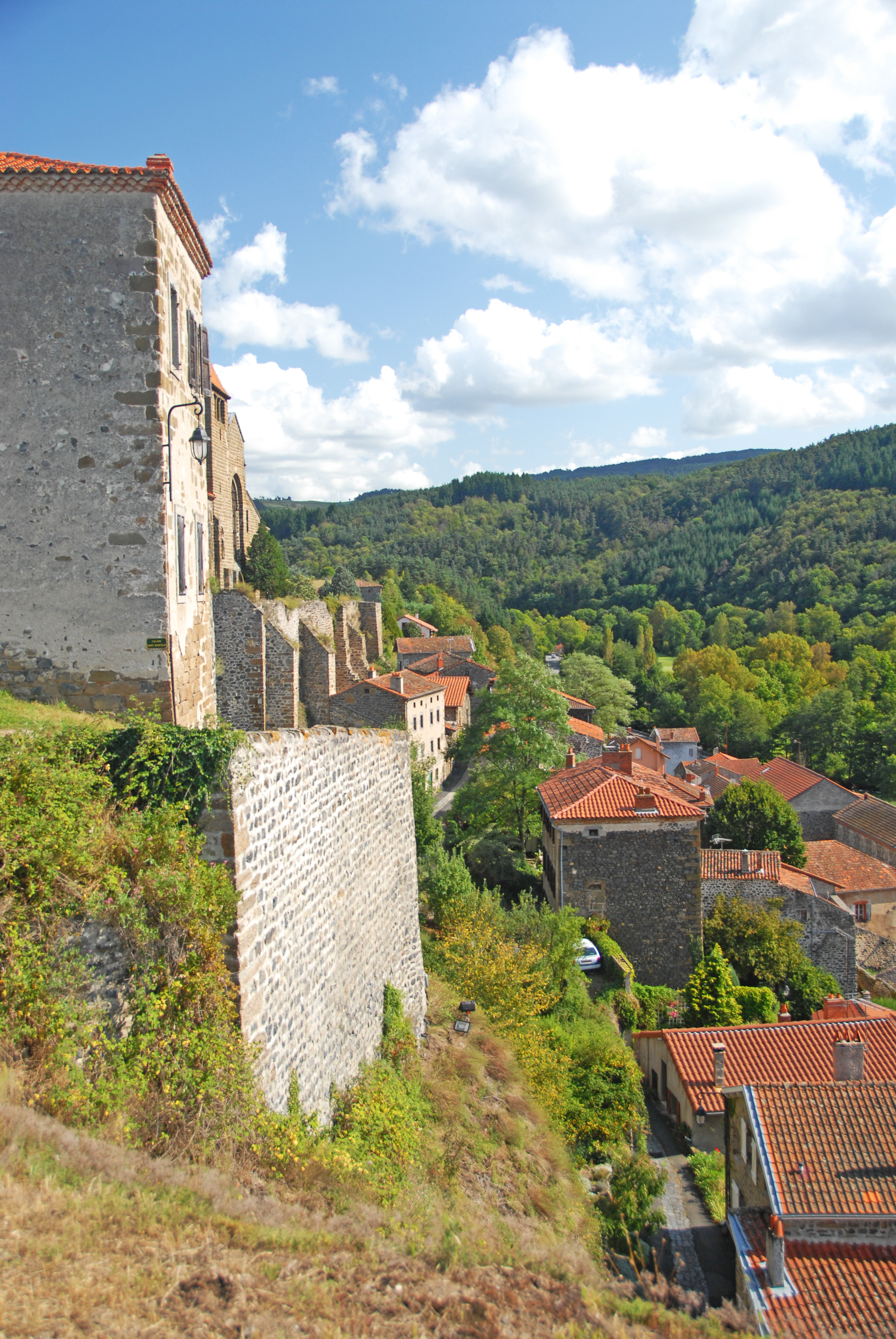 Chanteuges, westl. Wehrmauer, Unterdorf